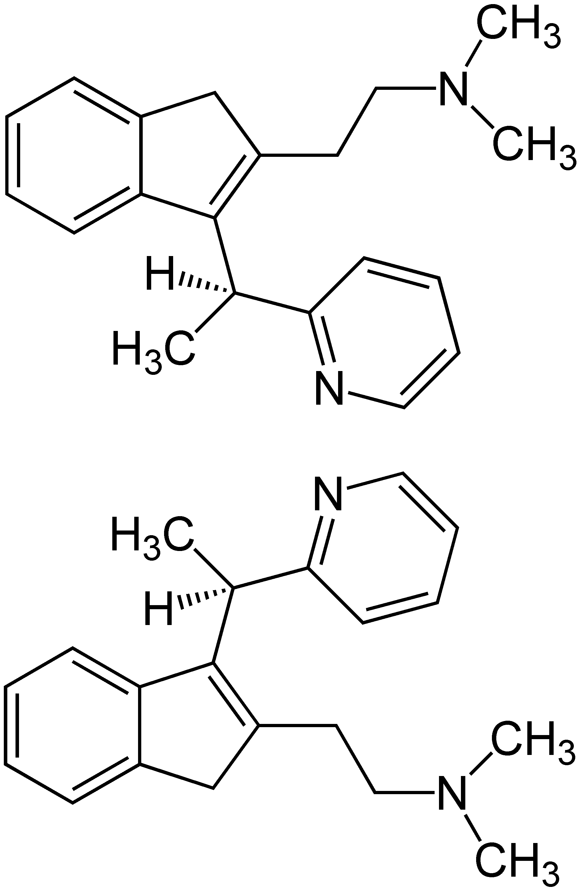 Strukturformeln der Dimetinden-Enantiomere